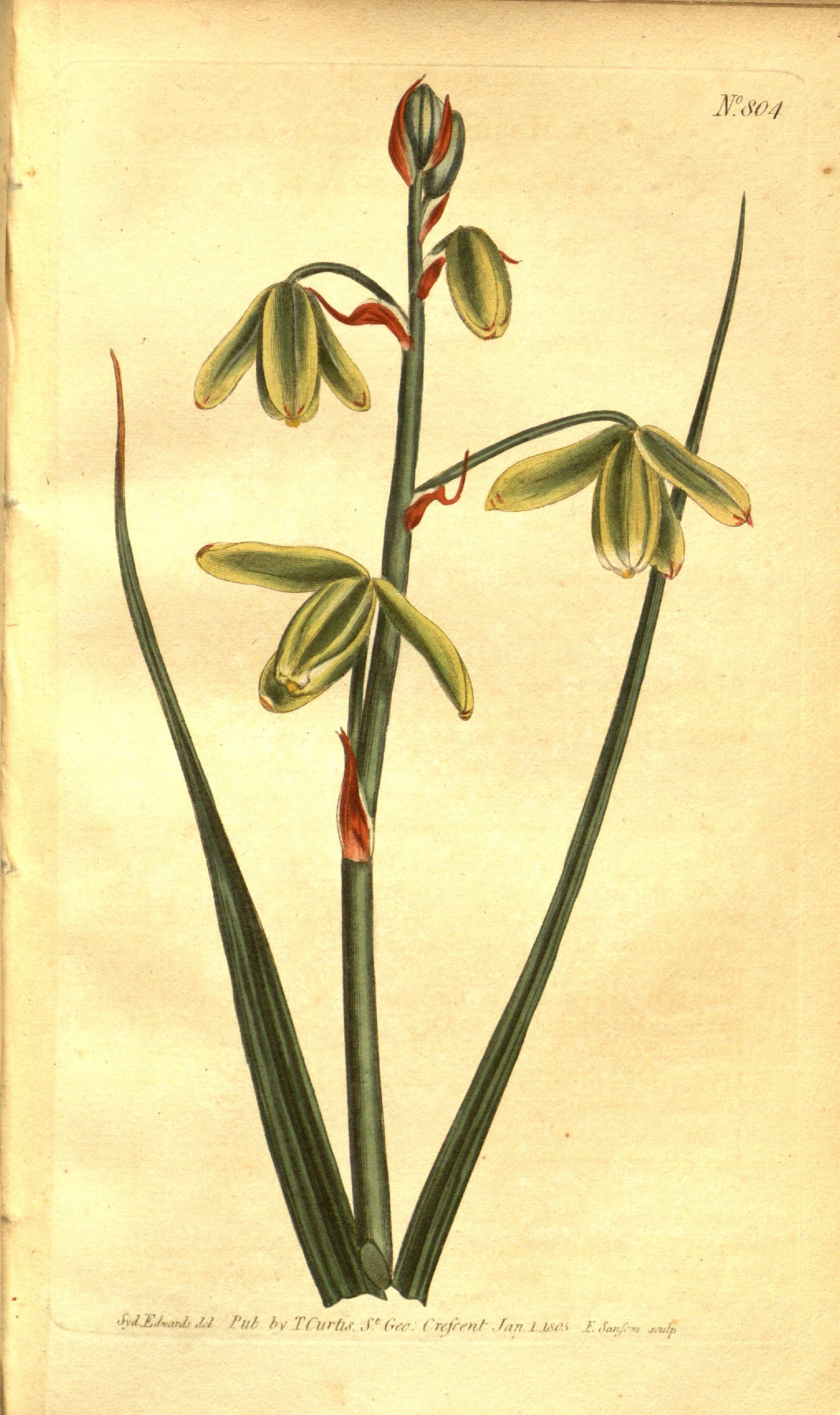 N°.$04 TCurtu.StGec Crejrent fan l.ja